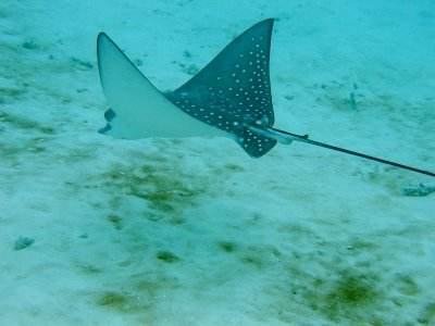 2002 François Battail Raie léopard juvénile photographiée aux Maldives dans 1,5 mètre d'eau